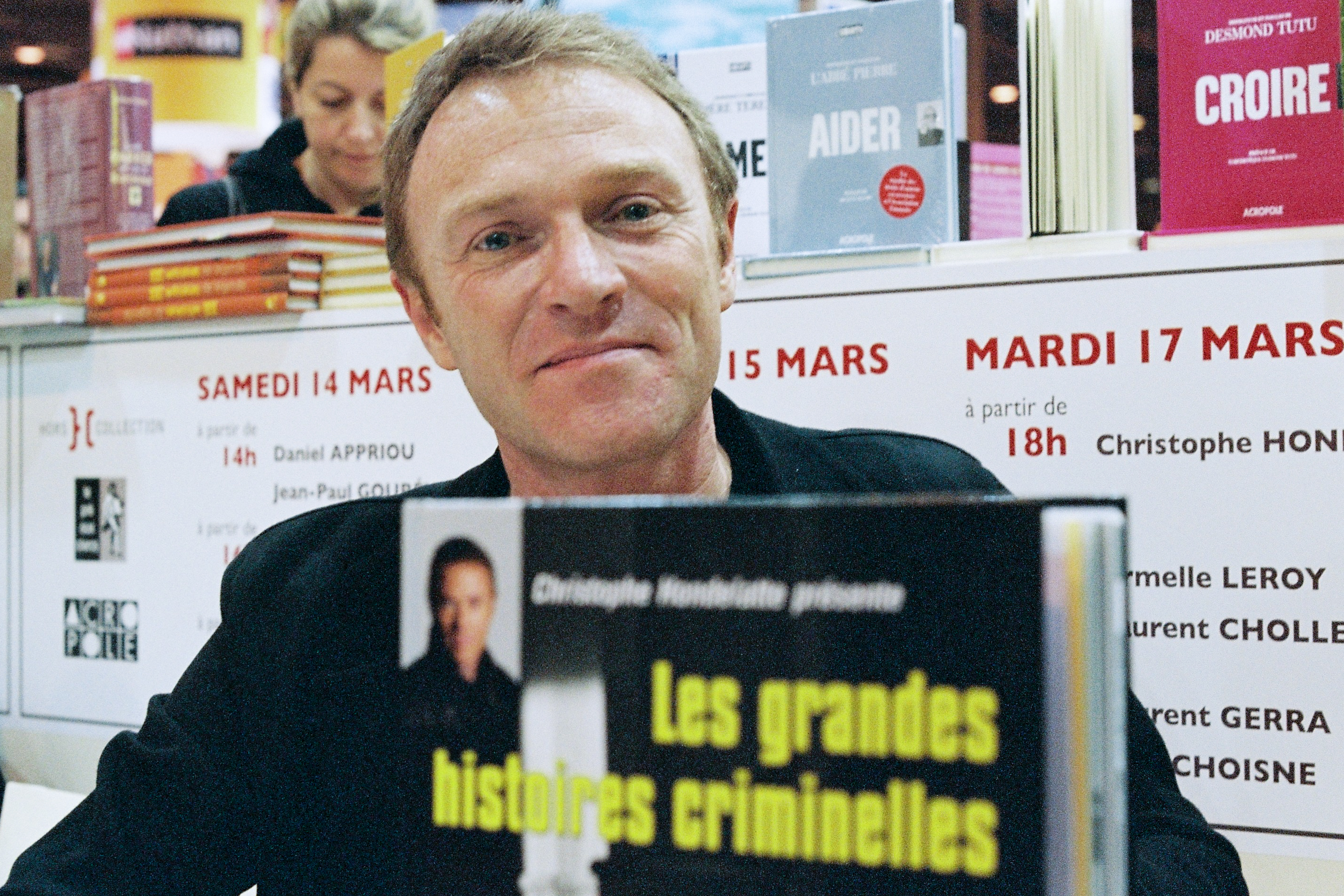 Christophe Hondelatte est un journaliste français de radio et de télévision. salon du livre 2009